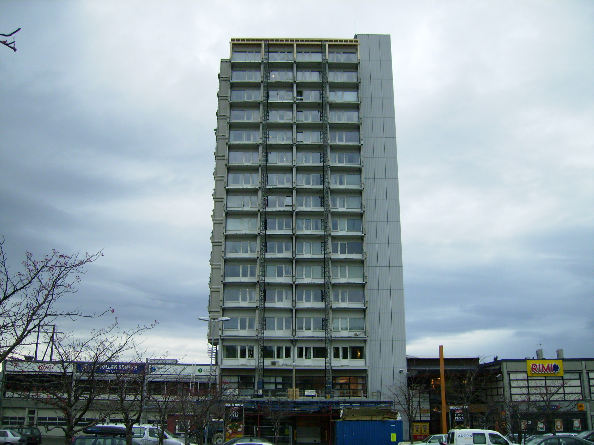 Risvollan borettslag, Trondheim, Norway